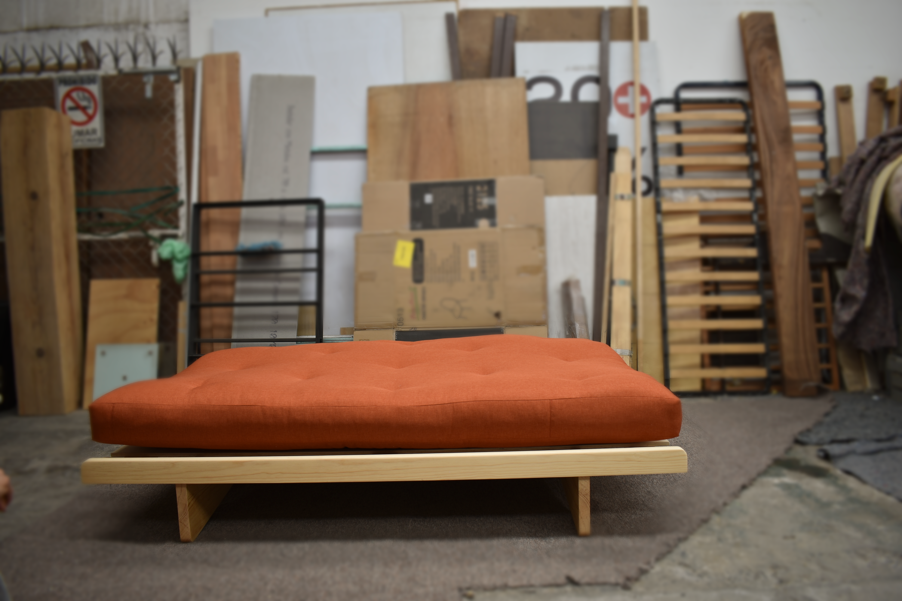 Futón Matrimonial, desplegado en cama, hecho en México por Mobiliario Azzione